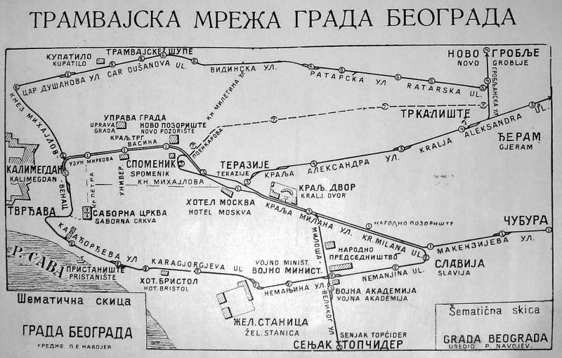 Трамвајска мрежа Београда 1908. године